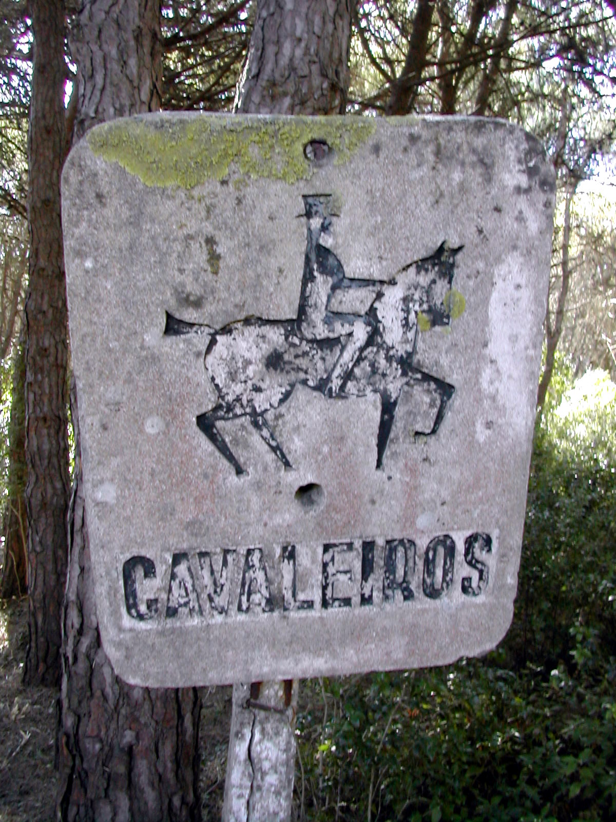 Sinal original de antiga pista de cavaleiros no Parque Florestal de Monsanto, Lisboa, Portugal